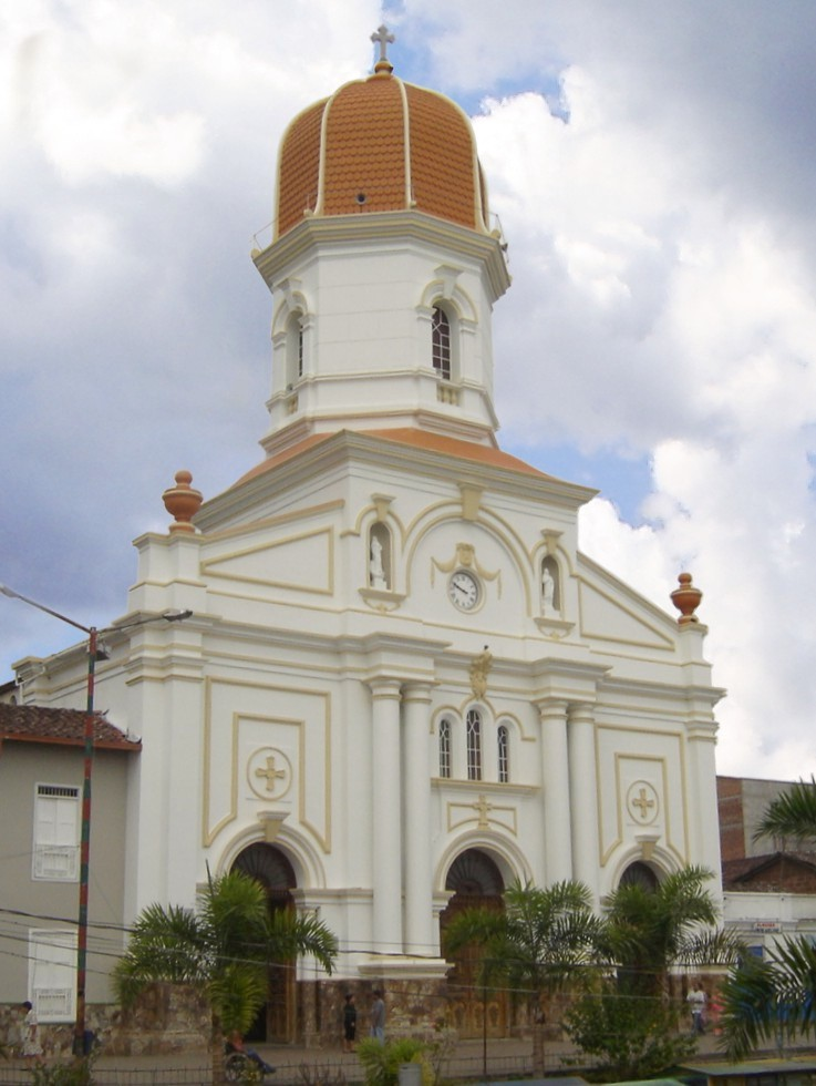 Iglesia del Municipio de Ituango, Antioquia, Colombia.